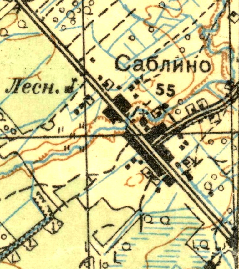 Топографическая карта Ленинградской области, квадрат О-36-14-А (п. Фёдоровский), деревня Саблино